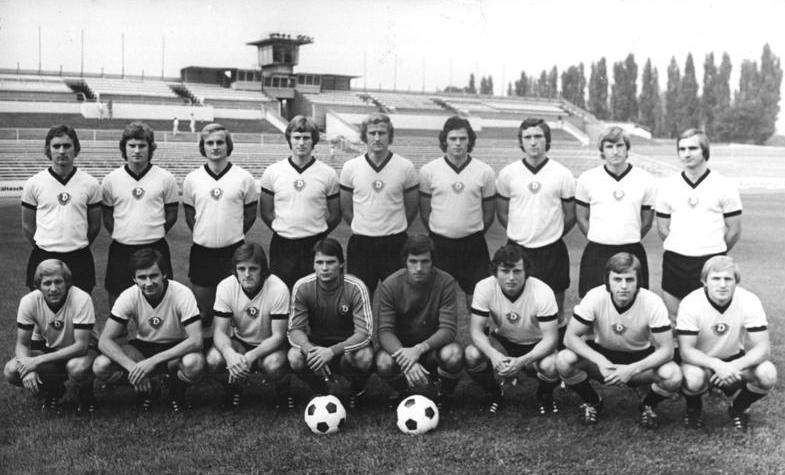 ADN-ZB-Häßler-1.9.76-str-Dresden: DDR-Fußball-Meister SG Dynamo Dresden wird die Aufgaben der Saison 1976-77 in folgender Besetzung in Angriff nehmen. Obere Reihe v.l.: Matthias Müller, Christian Helm, Matthias Donix, Udo Schmuck, Hans-Jürgen Kreische, Hartmut Schade, Gerd Weber, Hans-Jürgen Dörner und Klaus Müller. Untere Reihe v.l.: Gerd Heidler, Reinhard Häfner, Peter Kotte, Klaus Boden, Jörg Klimpel, Frank Richter, Rainer Sachse und Dieter Riedel.